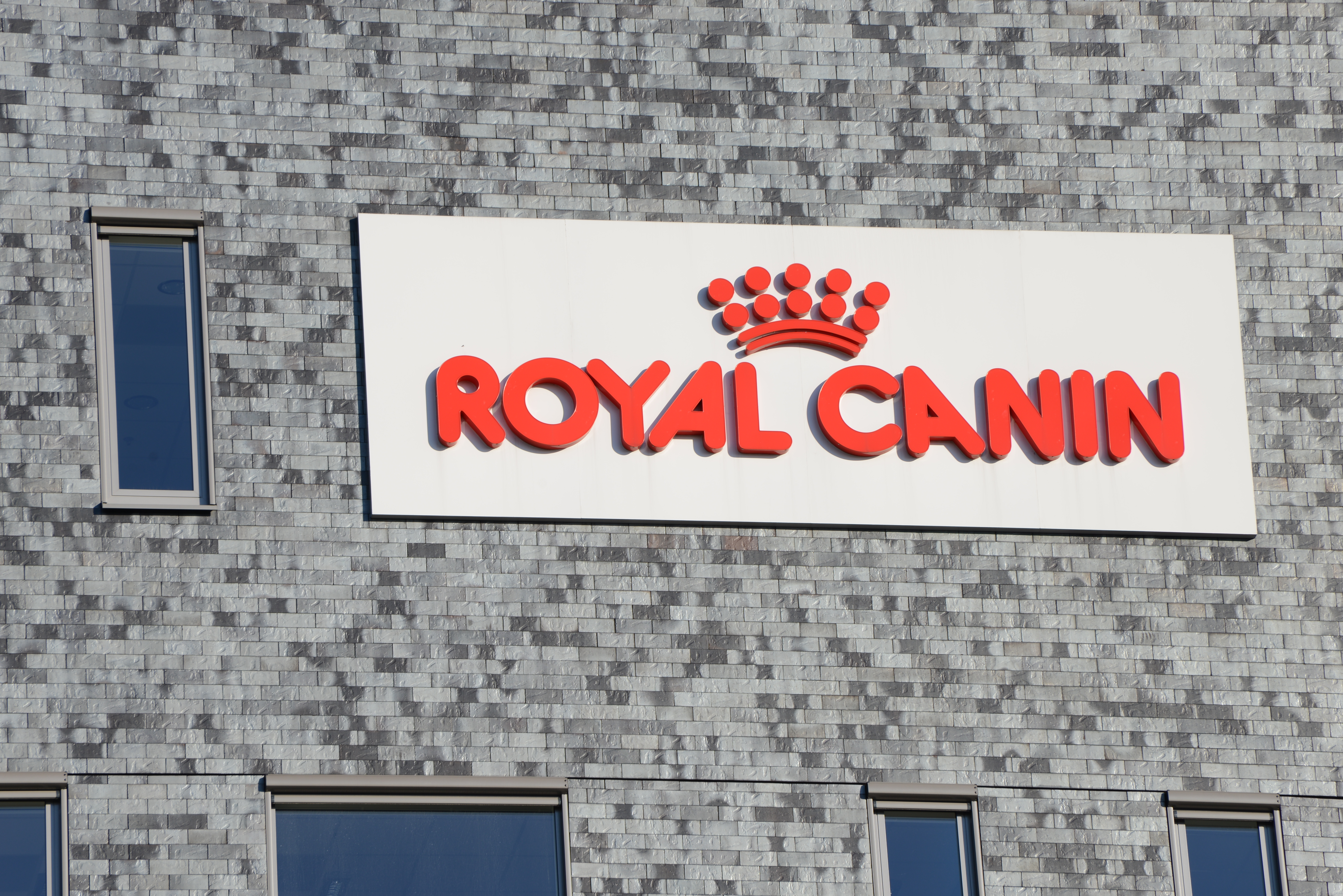 Logo van Royal Canin op het kantoorgebouw van Royal Canin Nederland aan de Poort van Veghel